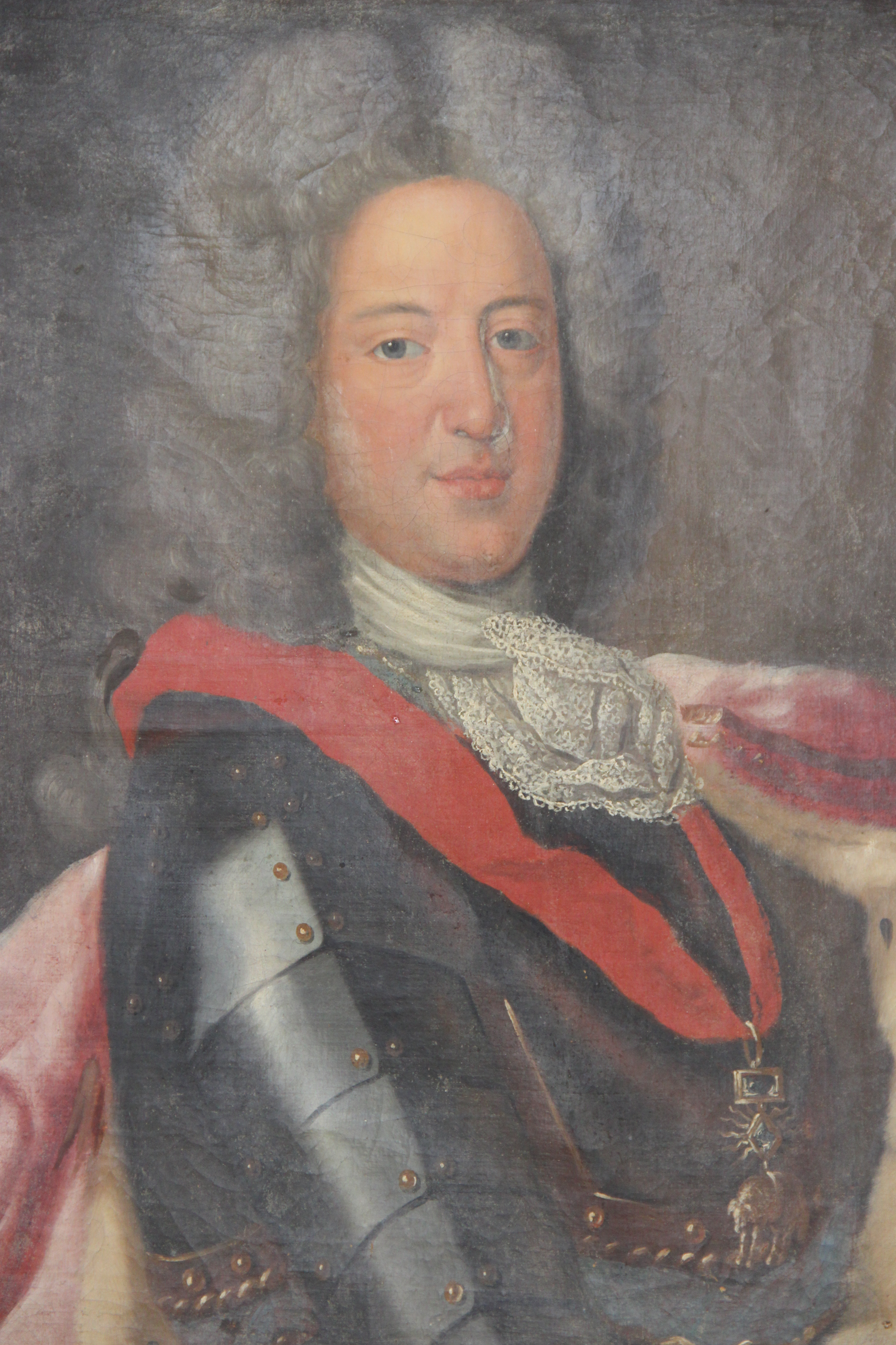 Portrait de Charles Henri de Lorraine-Vaudémont dans le hall de la mairie